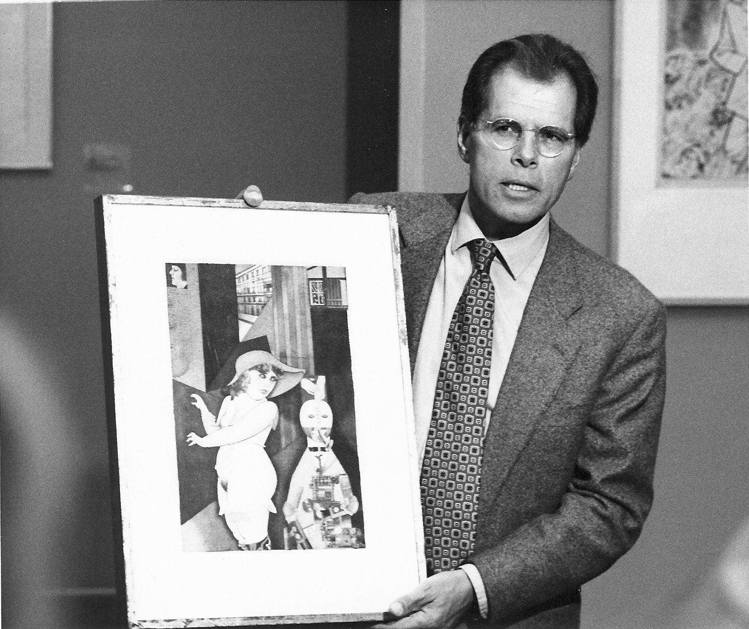 Christian von Holst beim Aufbau der Ausstellung "George Grosz: Berlin - New York" in der Staatsgalerie Stuttgart